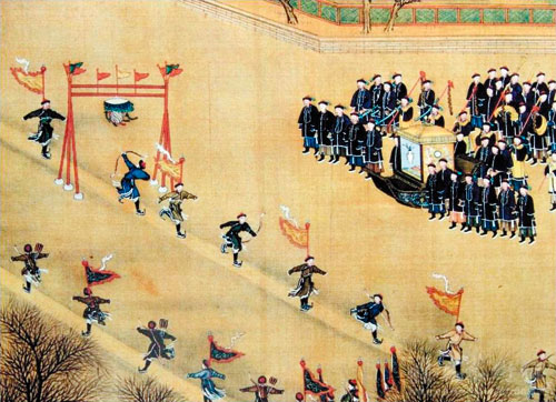 冰嬉图，清代画家张为邦、姚文翰所绘。